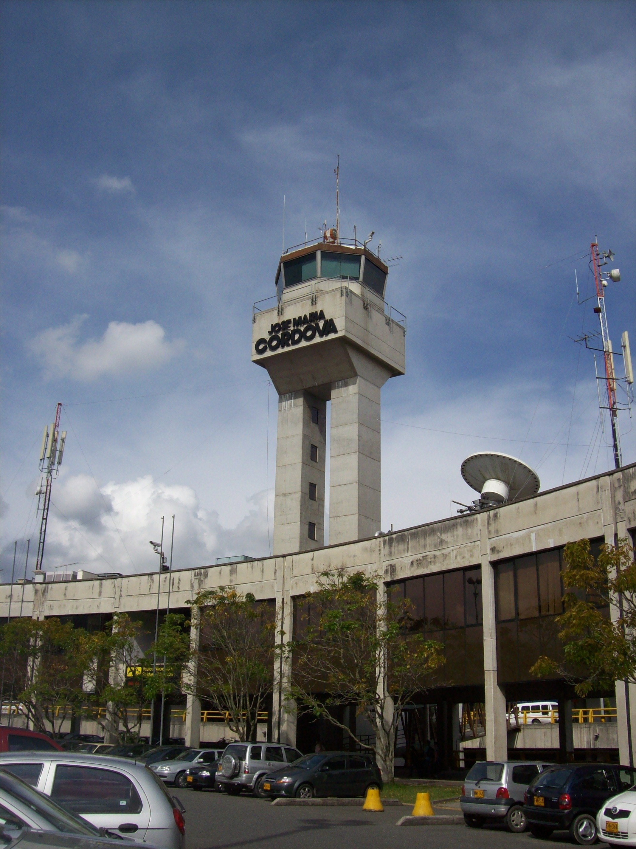 Torre de control del Aeropuerto Internacional José María Córdova.